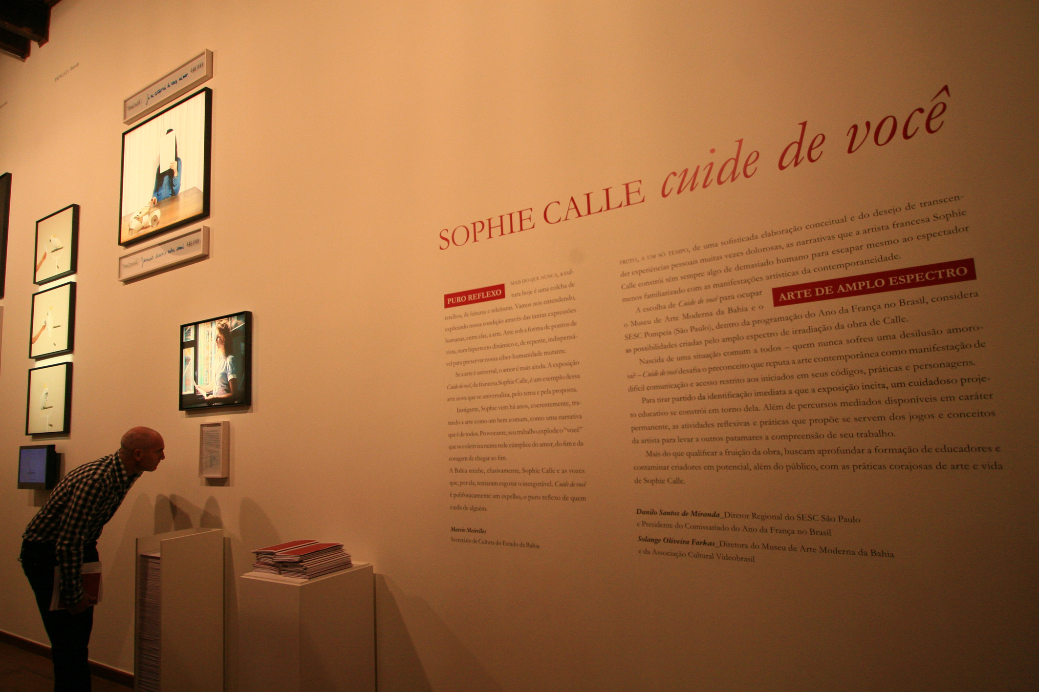 Foi aberta nesta terça-feira (22) a exposição Cuide de Você (Prenez Soin de Vous), da francesa Sophie Calle. A mostra ficará na cidade até 22 de novembro, de terça a domingo, com entrada gratuita e livre para todos os públicos. Foto: Roberto Viana / AGECOM